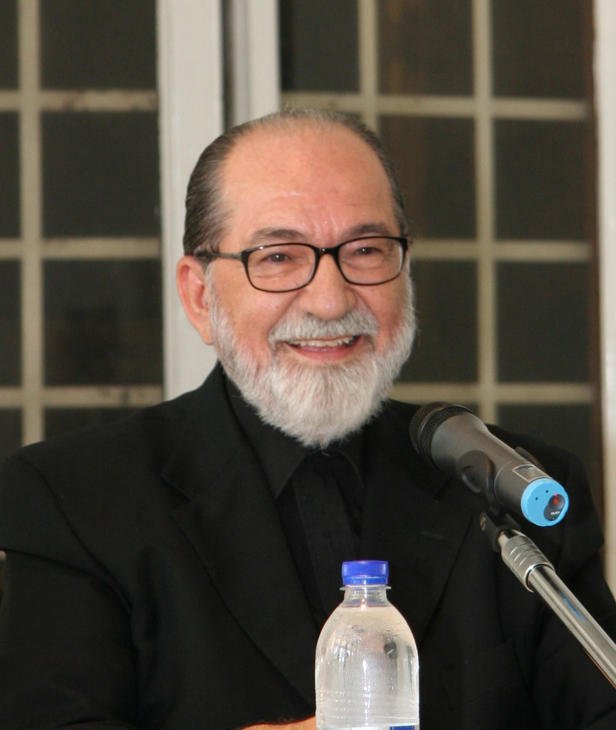 sua Eminenza Rev.ma il Metropolita Ortodosso d'Italia e Malta Gennadios